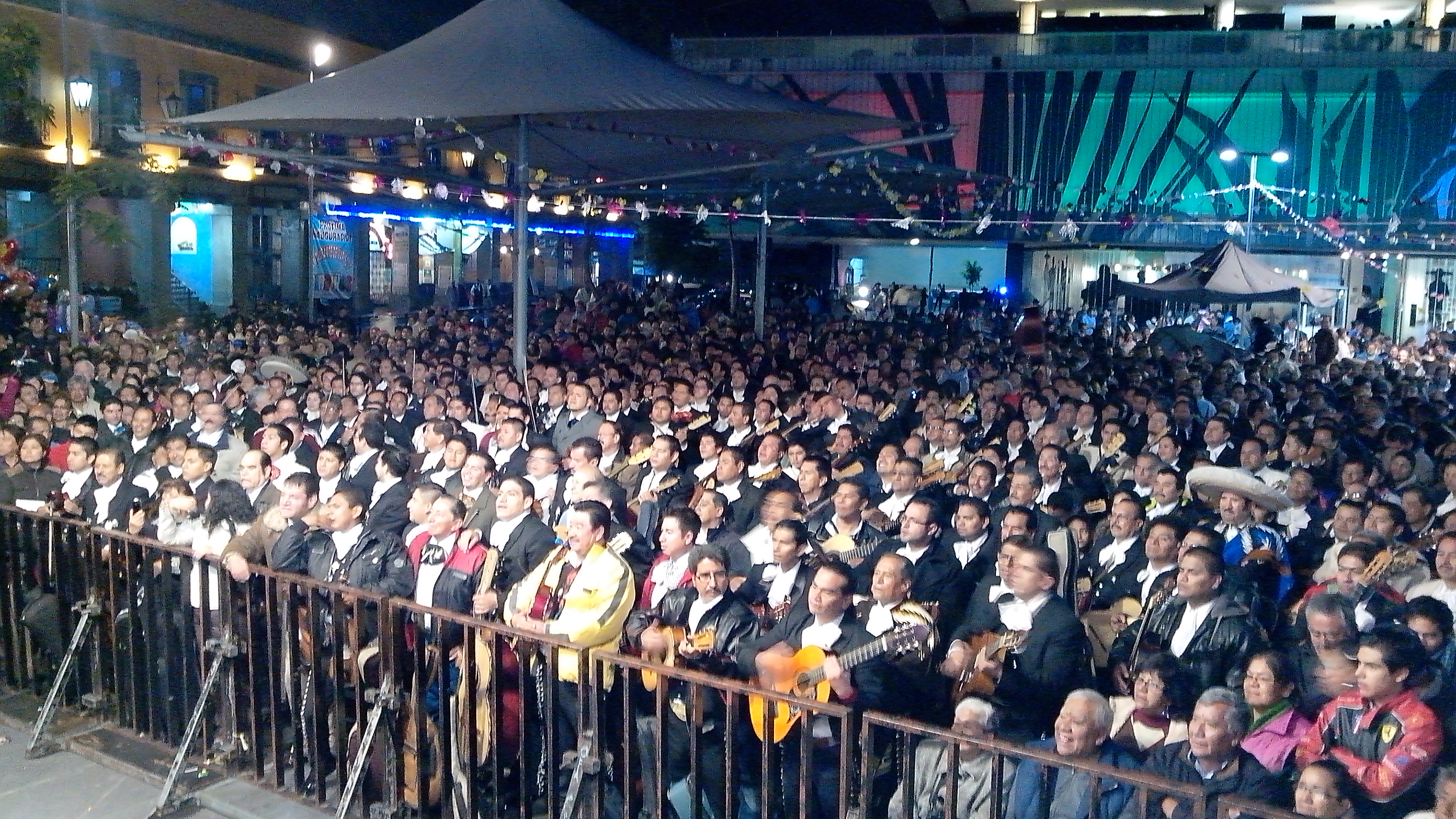 Mañanitas colectivas de mariachis en la fiesta patronal de Santa Cecilia.